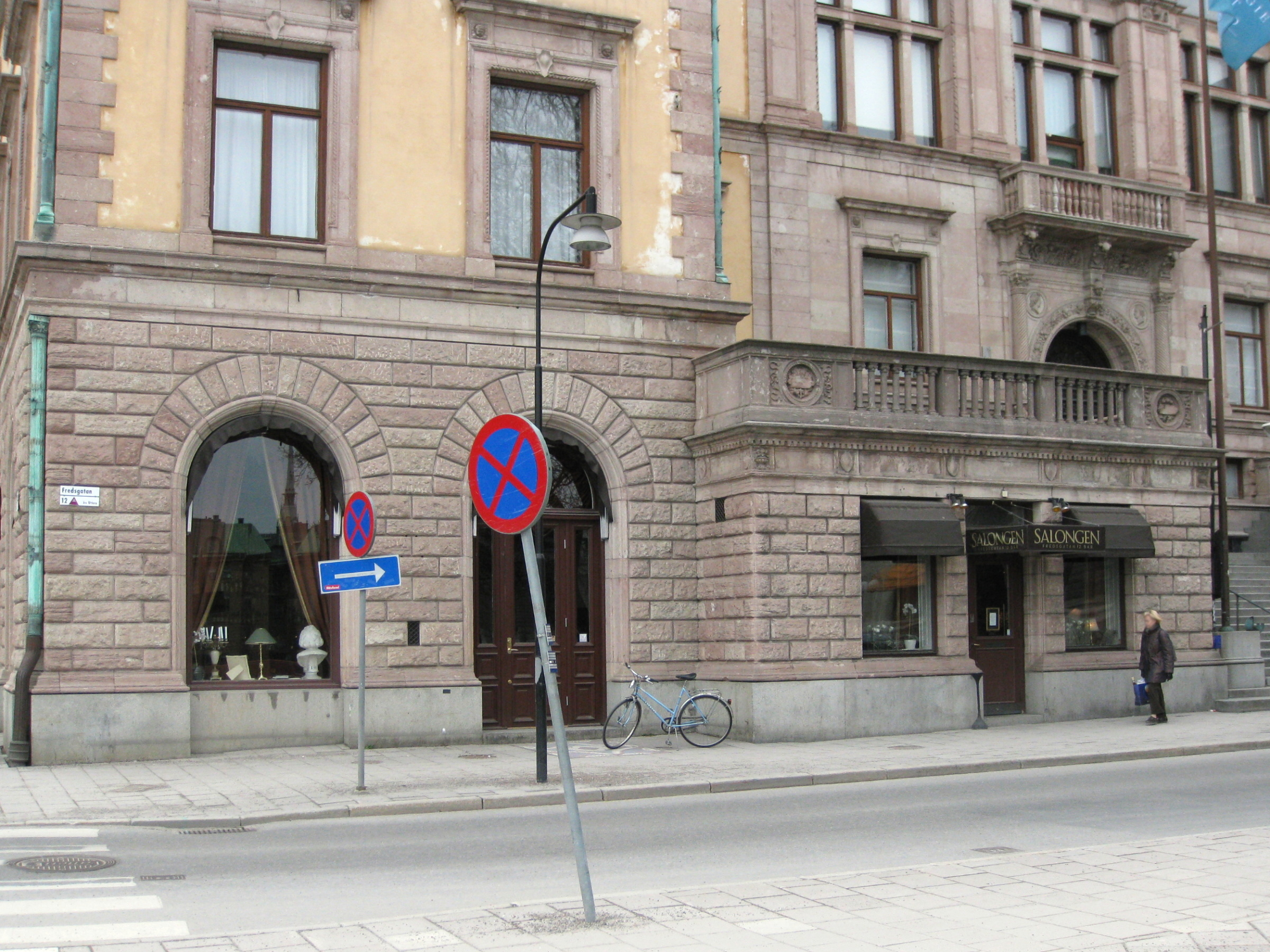 Salongen, Fredsgatan 12, Stockholm